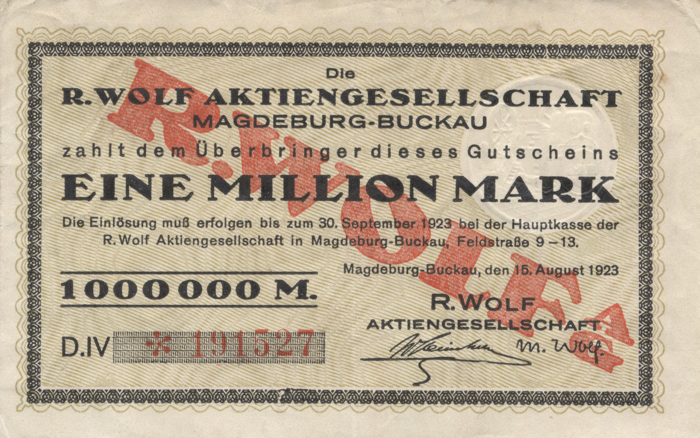 Gutschein über 1.000.000 Mark der Rudolf Wolf AG, Magdeburg-Buckau